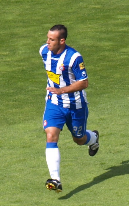 Moisés Hurtado en el partido que enfrentó al RCD Español y al Málaga CF en el último partido de La Liga 2008/09 en el estadio Olímpico de Montjuic